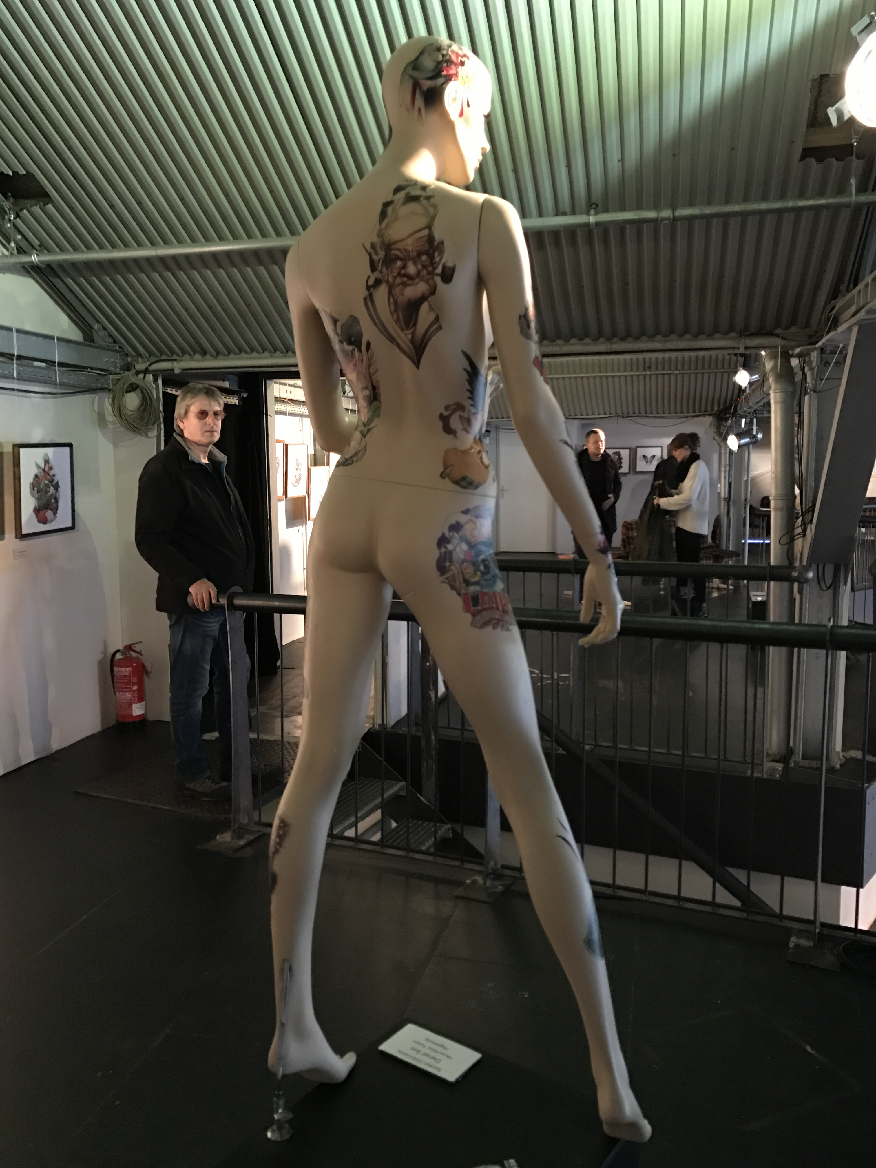 GAT - Grüße aus Tätowierungen in Berlin Oktober 2017. Als Gast der Tattookünstler Manfred Kohrs